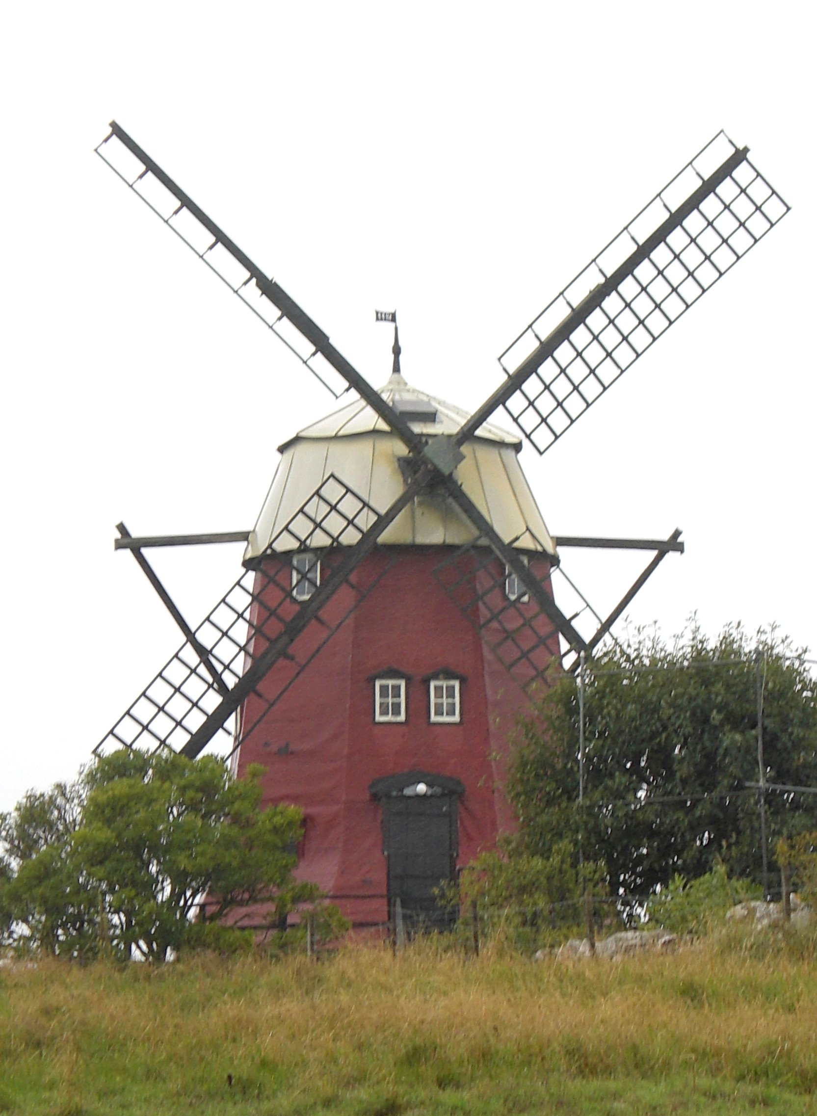 Mühle von Strandtorp an der Landstraße 136 auf Öland, Schweden